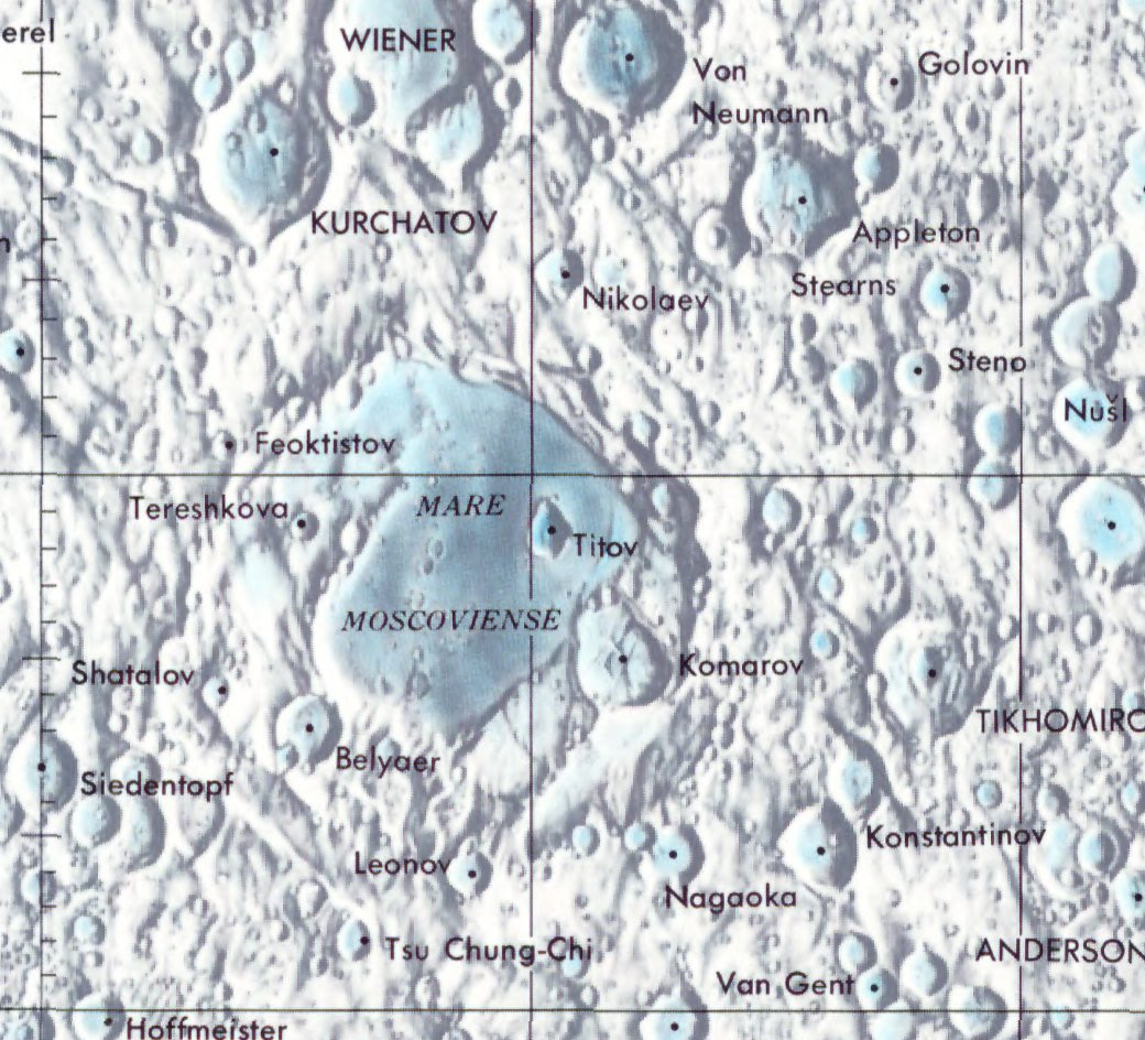 Cráter lunar Titov. Localización. (Lunar Chart LPC1. Second Edition)